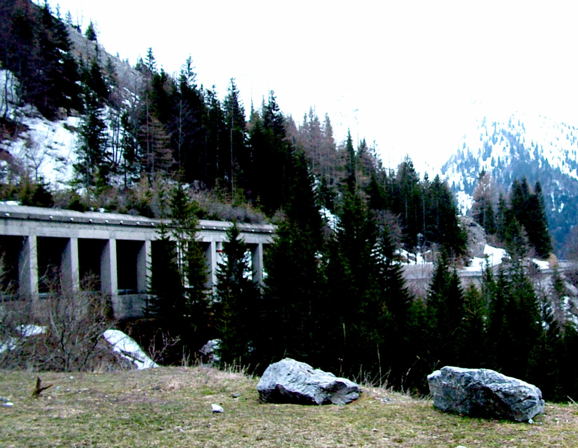 Plöcken-hágó (Ausztria/Olaszország)